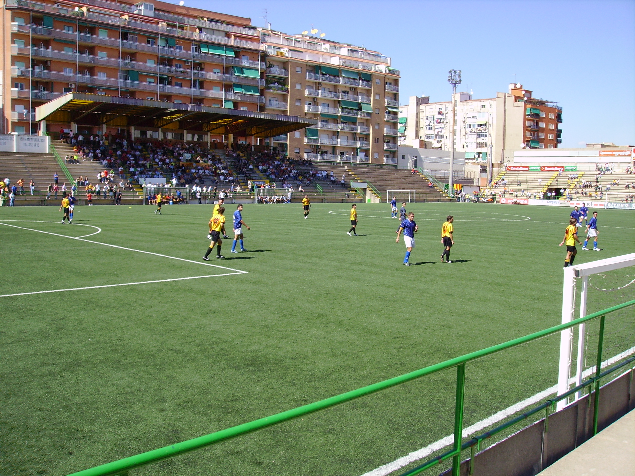 La UE Sant Andreu i la UDA Gramenet jugant un partit al Narcís Sala (17/09/2006).